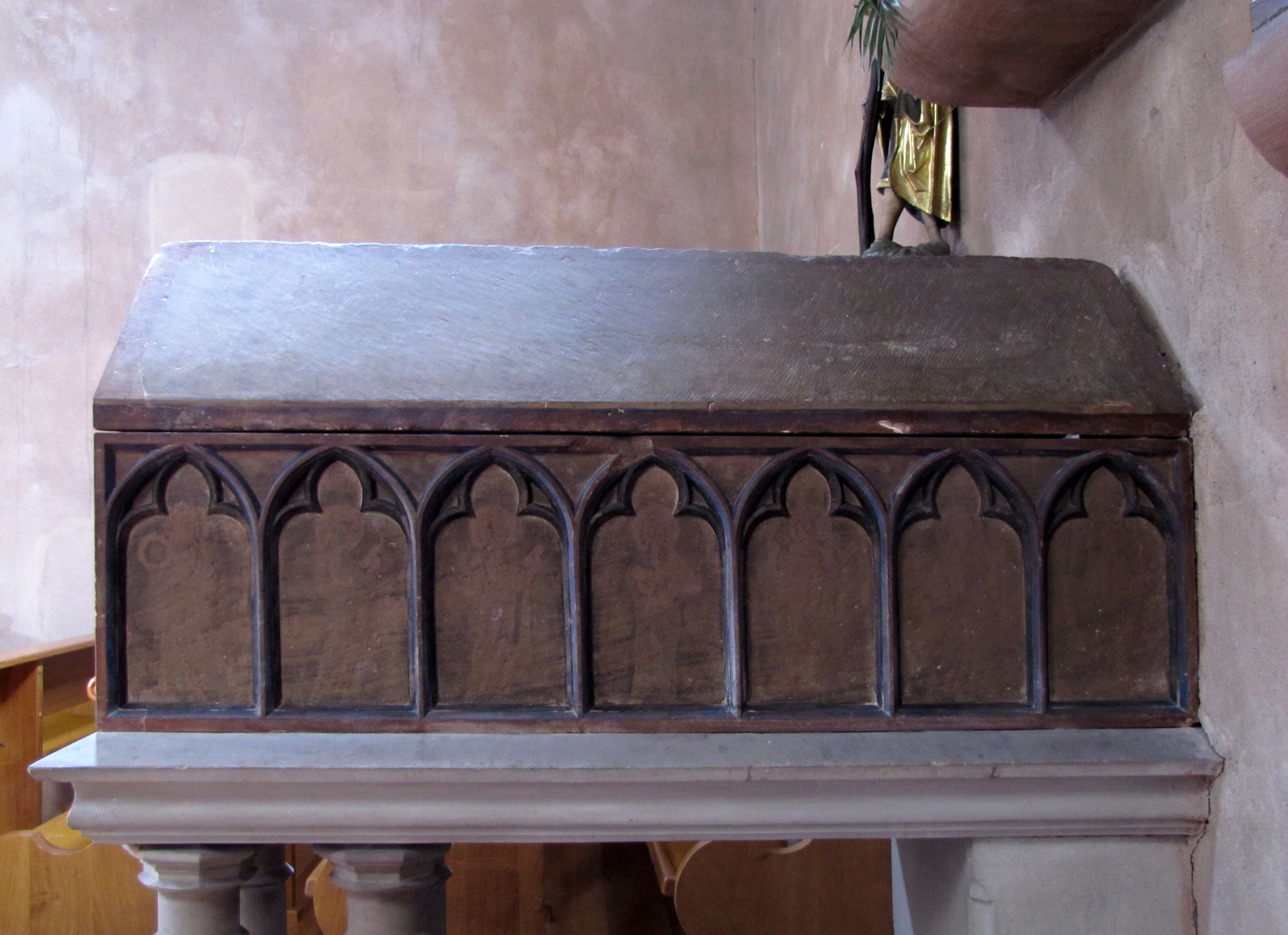 Alsace, Bas-Rhin, Église Saint-Trophime d'Eschau (PA00084707, IA00023089). Châsse de Ste Sophie (XIVe): St Oswald, St Jean-Baptiste, Ste Catherine d'Alexandrie, Expulsion des marchands du Temple, Adoration des Mages, mise au Tombeau, Ste Sophie et ses trois filles. This object is classé Monument Historique in the base Palissy, database of the French furniture patrimony of the French ministry of culture, under the references PM67000076 and IM67000135.